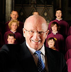 Bjørn Moe forann guttekoret i Nidarosdomen.